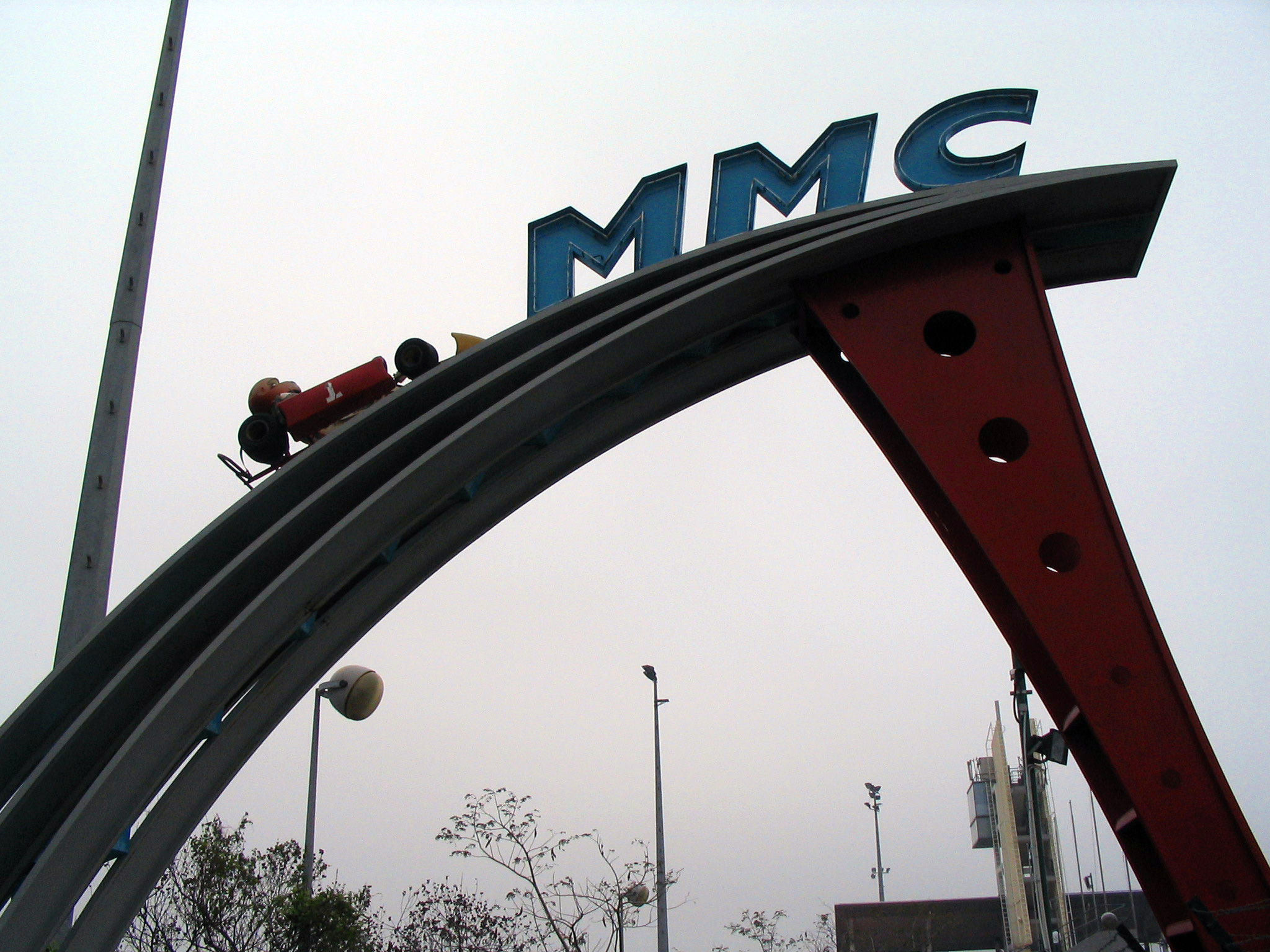 Macao Motorsports Club